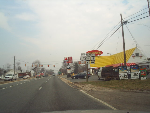 M3367S-4504